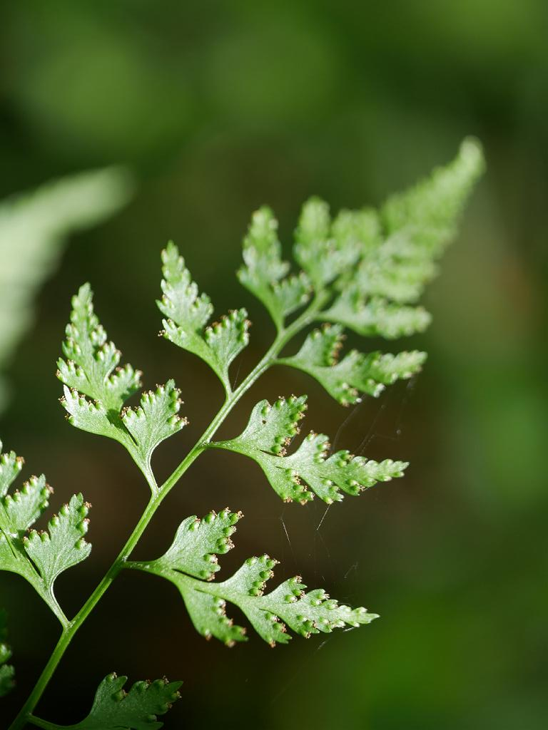 Dennstaedtia wilfordii：オウレンシダ 2018/09/24 岐阜県ひるがの高原：Hirugano Highland, Gifu Pref. Japan